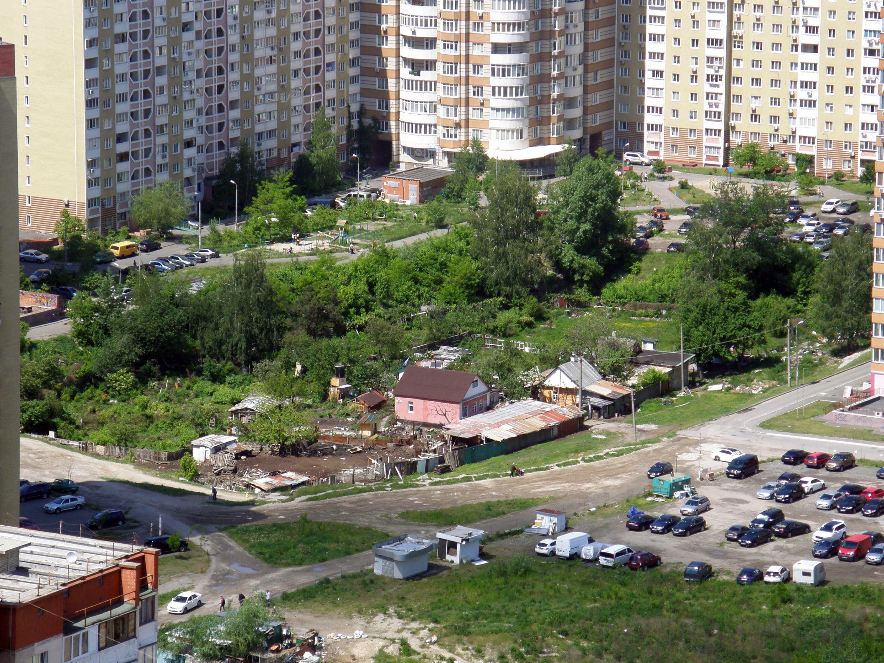 улица Батуринская